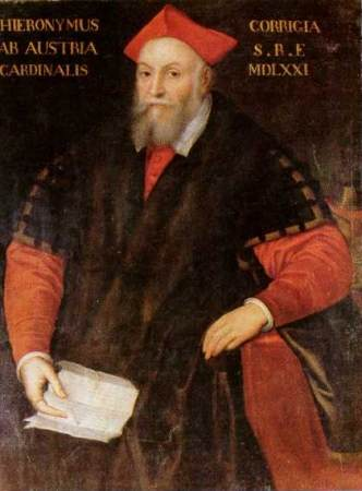 Ritratto del cardinale Girolamo da Correggio (1511–1572)